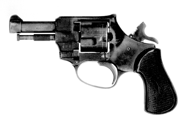 Revolver